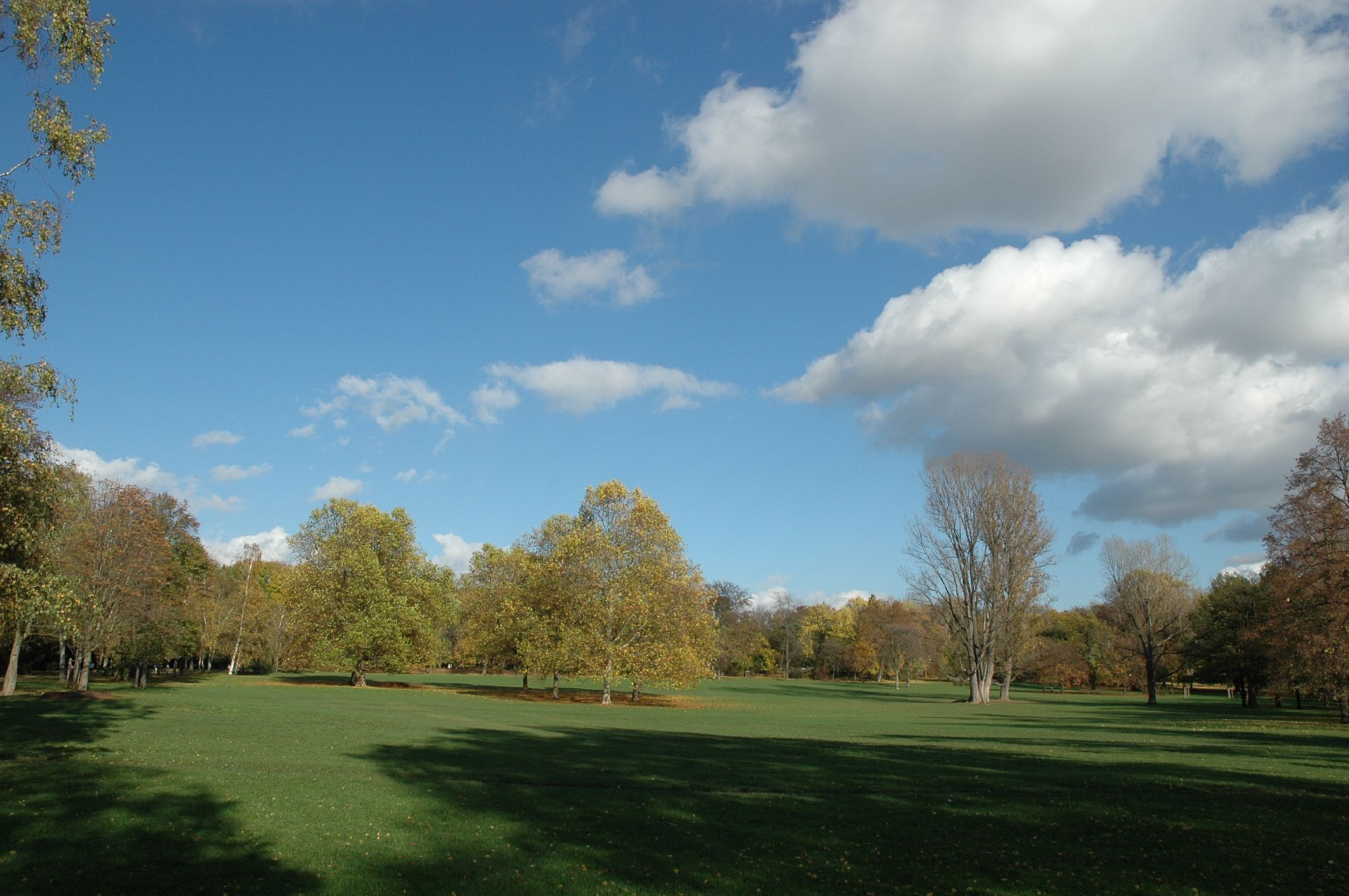 Grueneburgpark Frankfurt am Main